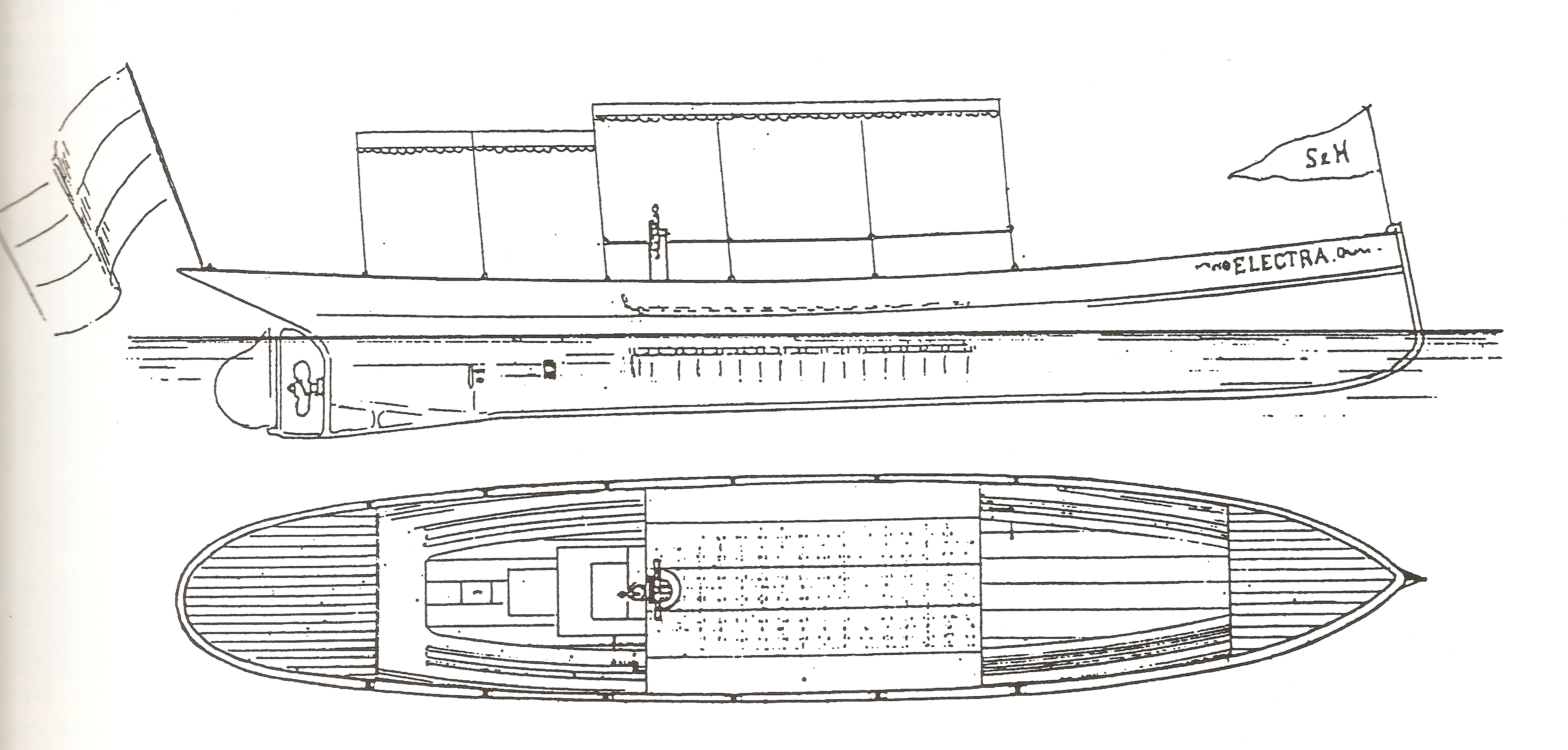 Skizze des Elektrobootes Electra der Firma Siemens&Halske